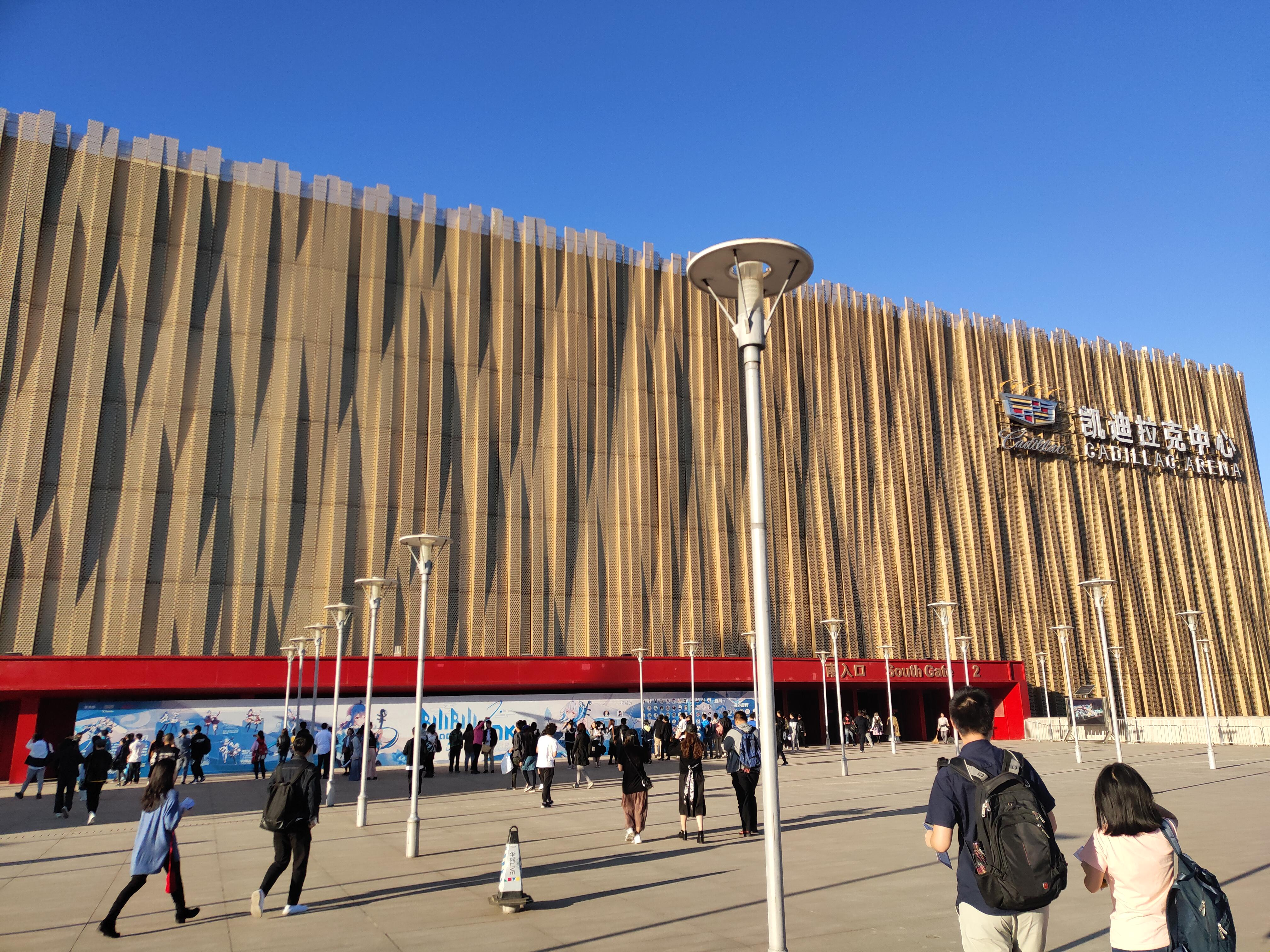 北京凯迪拉克中心